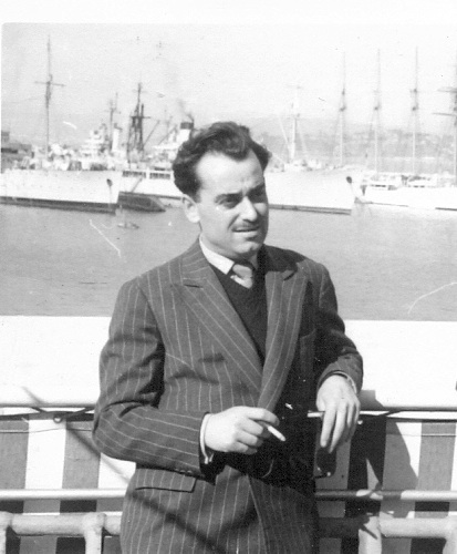 Francisco Soler en Valparaíso